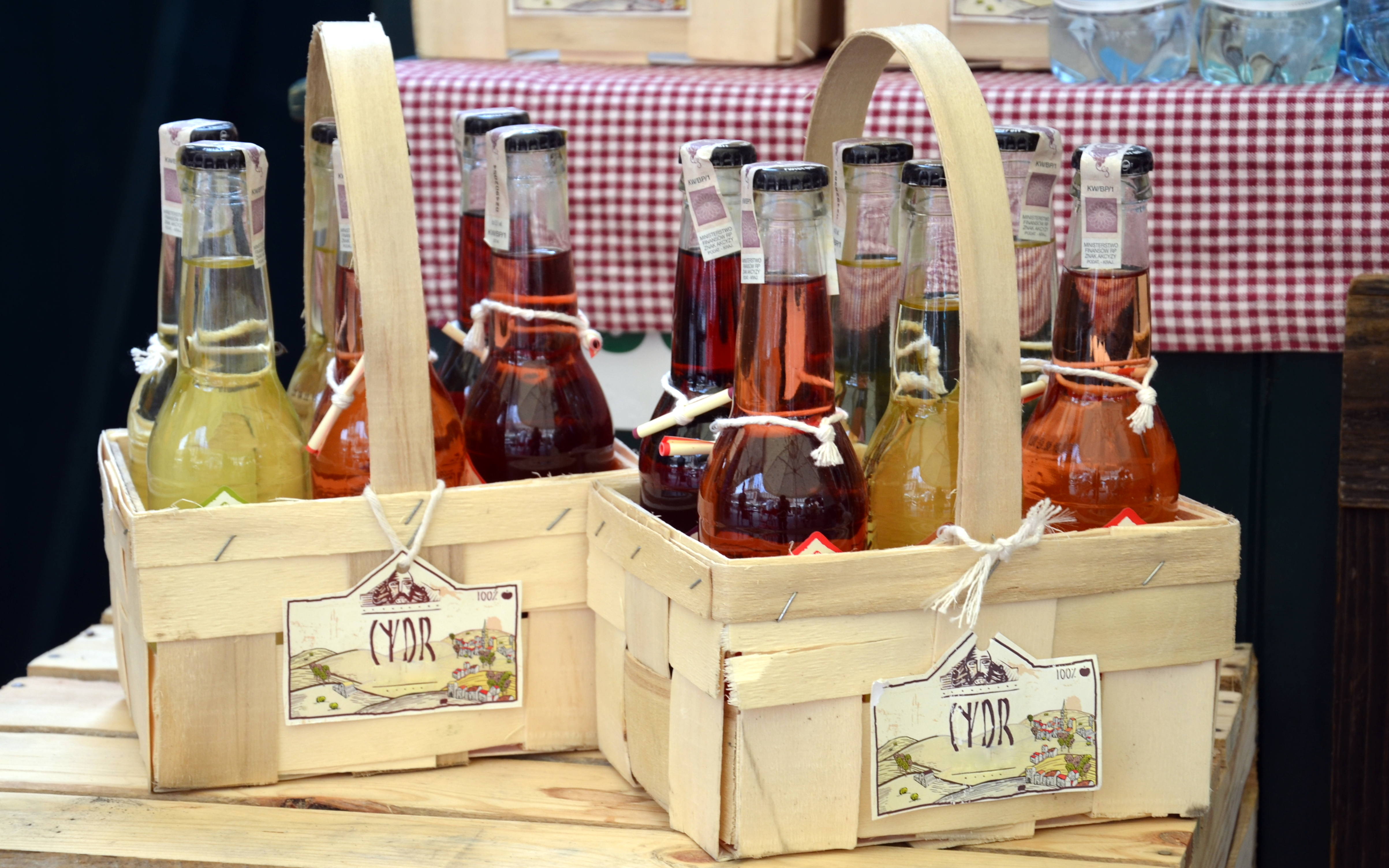 Apfelwein, Krakau